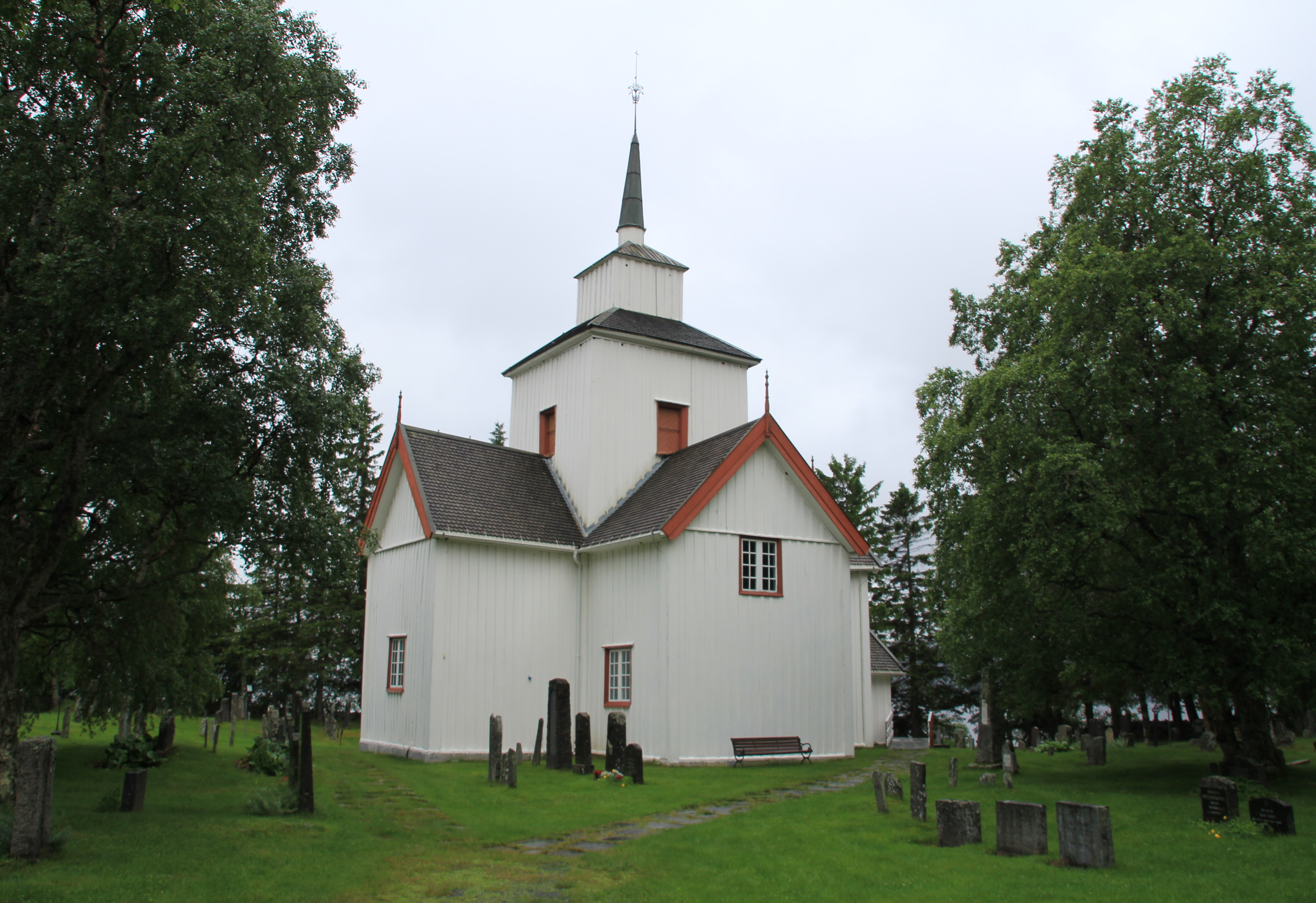 Rauland kirke er en korskirke fra 1803 i Vinje kommune, Telemark fylke.